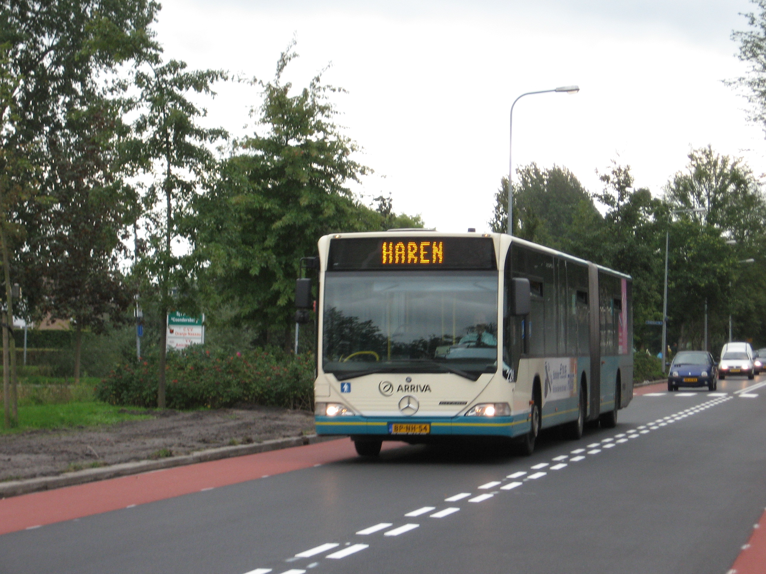 Arriva Citaro G op de Helperzoom in Groningen